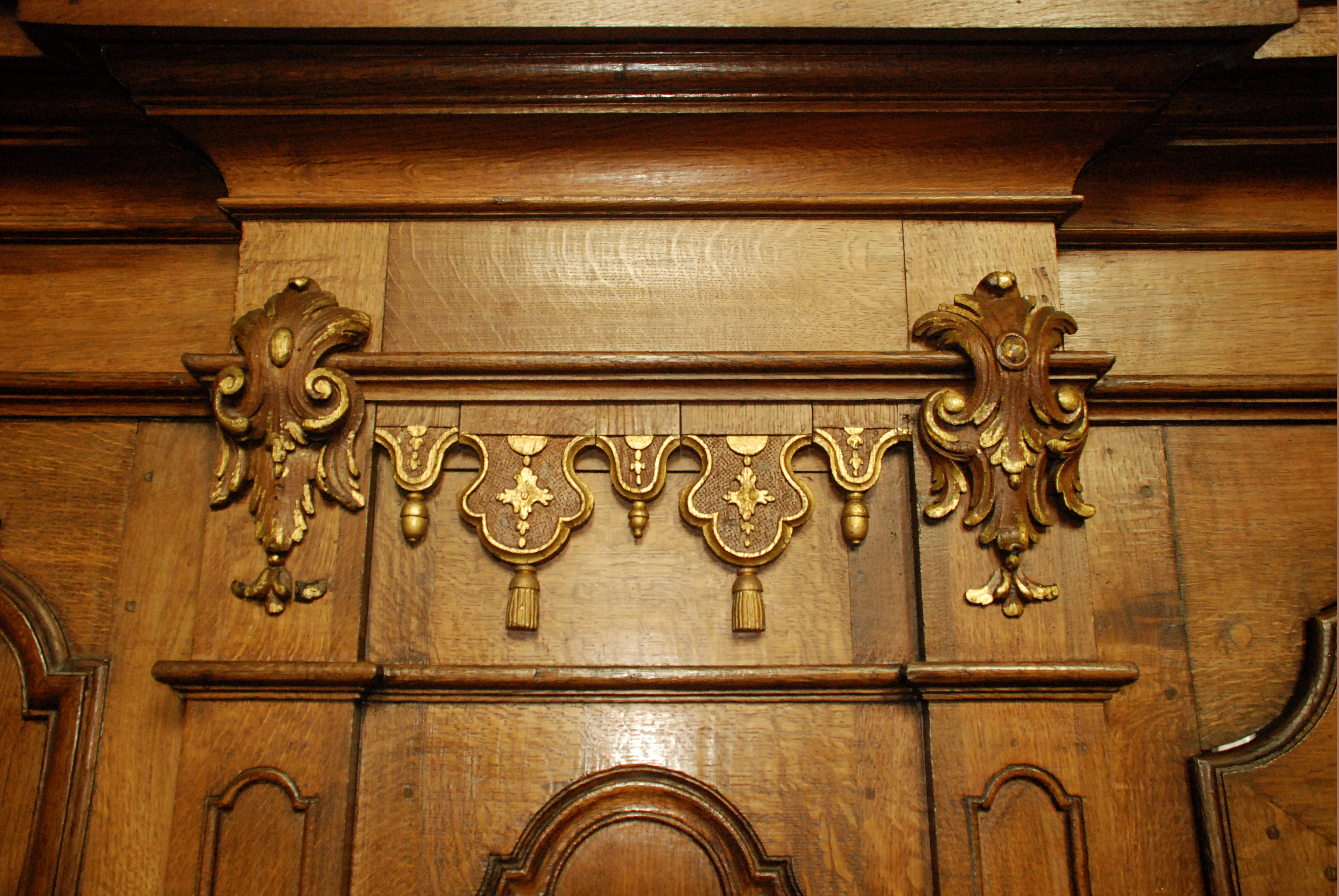 Belgique - Brabant wallon - Église Notre-Dame de Mousty